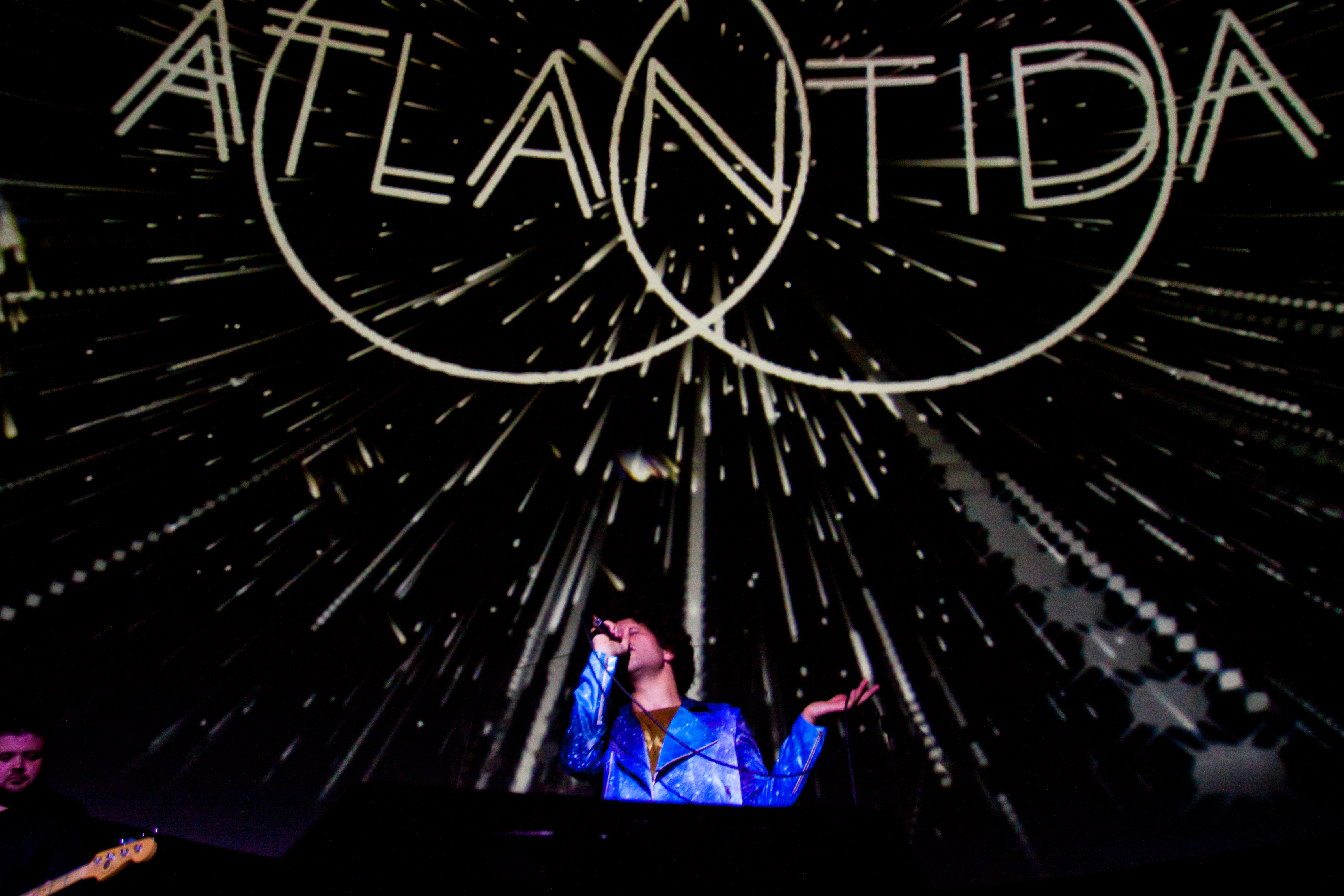 Закрытый концерт в киевском Планетарии. Сентябрь 2013.